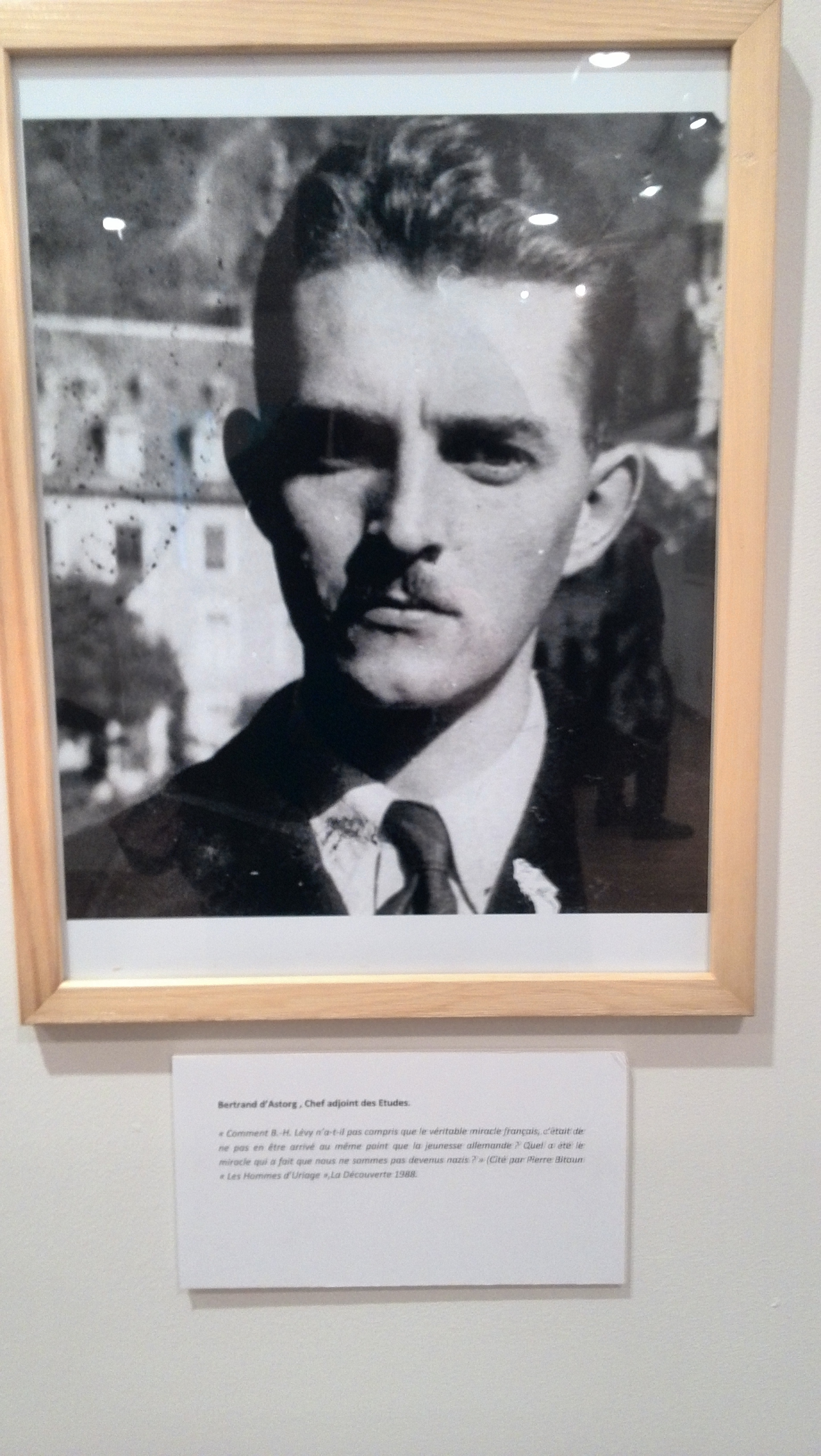 Portrait de Bertrand d'Astorg à l'école des cadres d'Uriage, 1940-42.